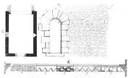 dessins par Eugène Woillez : Plan initial de la nef, fenêtre avec des claveaux partiellement simulés par des lignes gravées, corniche aujourd'hui disparue.